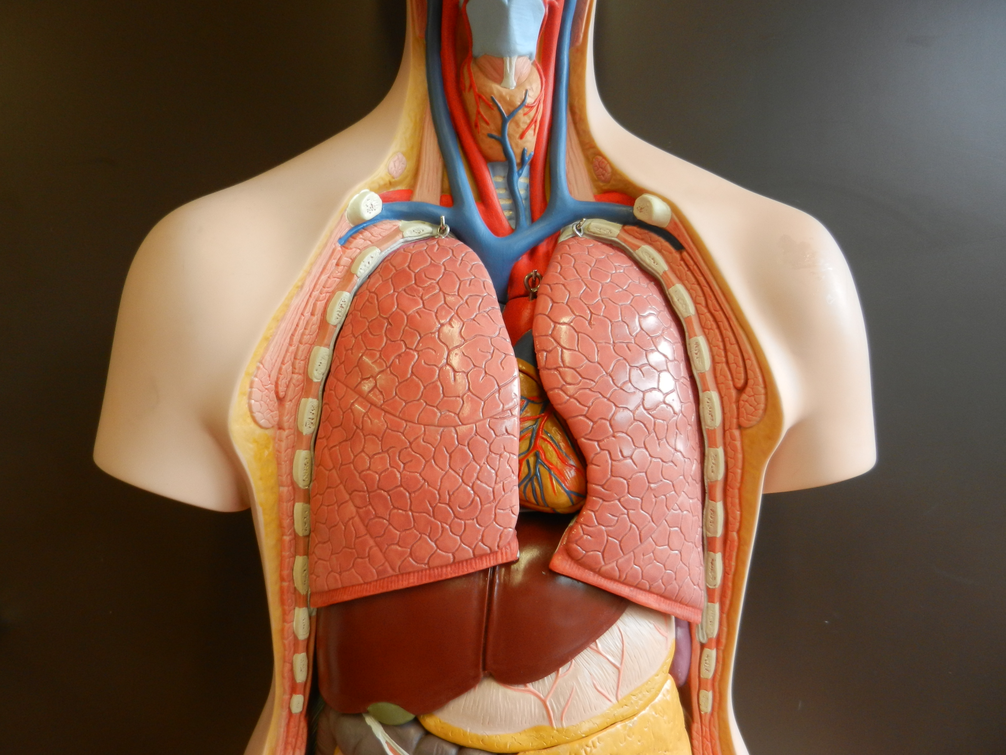 Brustraum des Menschen mit Lunge und Herz. Unten Leber, Magen und Teil des Dickdarms, welche zum Bauchraum gehören.